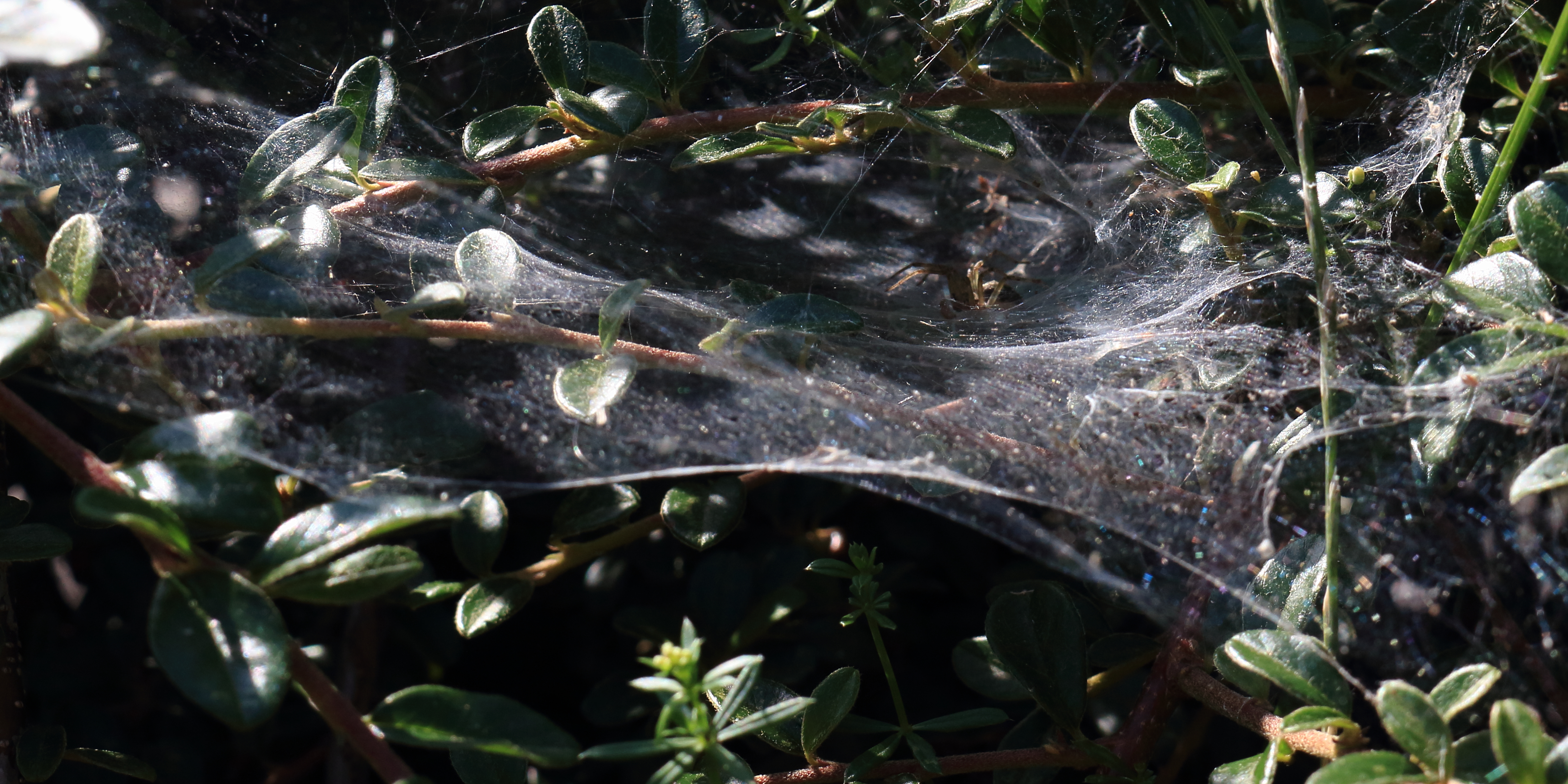 Trichter-Spinnennetze von Allagelena gracilens in der Hecke Die abgebildete Spinne/das Netz wurde am 14. Juli 2015 von Mhohner auf WP:RBIO/B bestimmt The spider/the web shown here has been identified from Mhohner on WP:RBIO/B 2015, July 14th